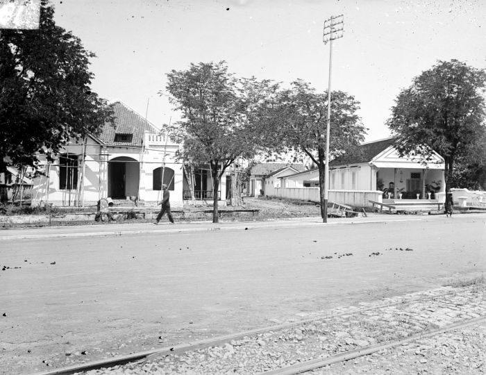 Negatief. Nieuwe huizen, Semarang